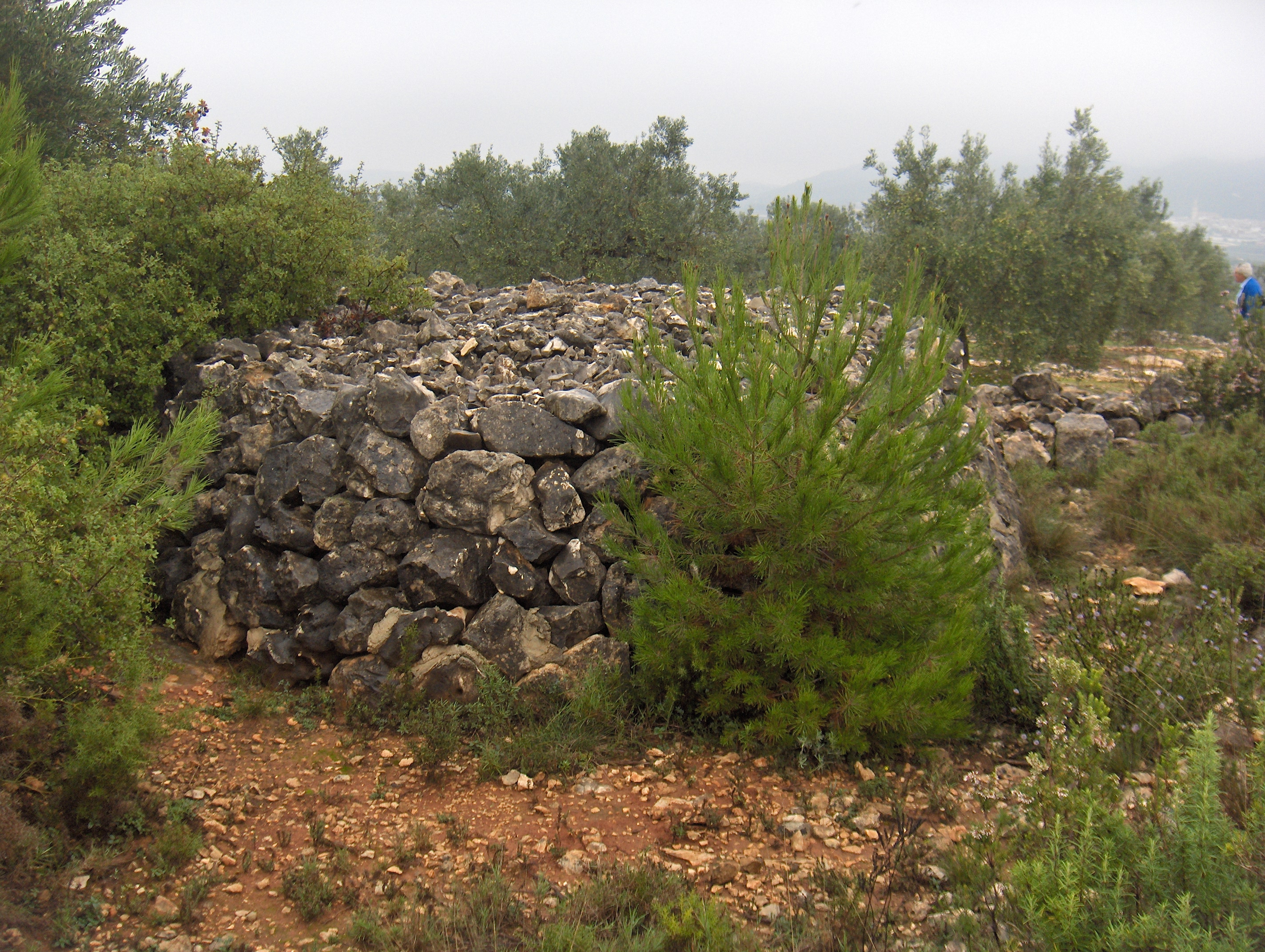 Construcción de piedra en seco del tipo majano. Localizada en la partida rural de La Rocha, Enguera (Valencia).